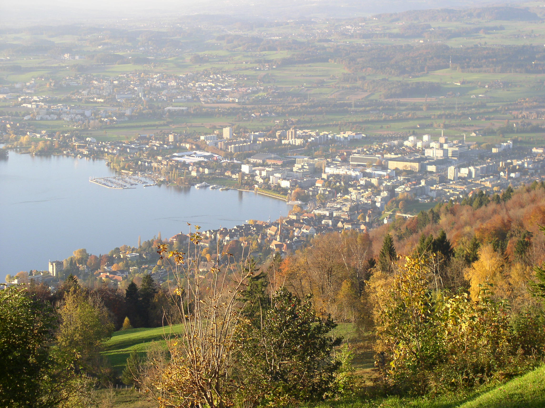 Description: Blick vom Zugerberg auf Zug und Steinhausen Source: photo taken by me, October 2005 Photographer: Baikonur